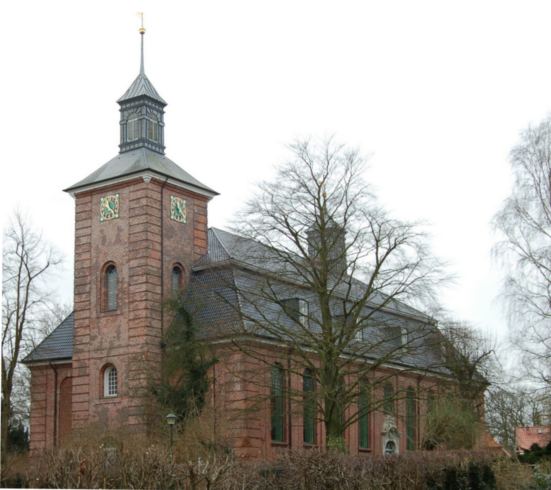 Die Klosterkirche in Uetersen Baujahr 1747/49 von der Promenade aus gesehen.